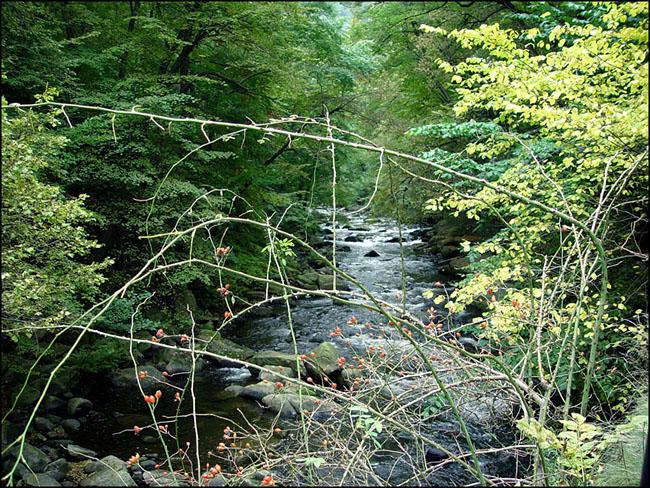 Beschreibung: im Bodetal Aufnahmedatum: 13. Oktober 2002 Fotograf: ArtMechanic